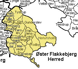 Øster Flakkebjerg Herred Sorø Amt , Denmark. Map by Svend-Erik Christiansen, edited by user:Nico-dk .